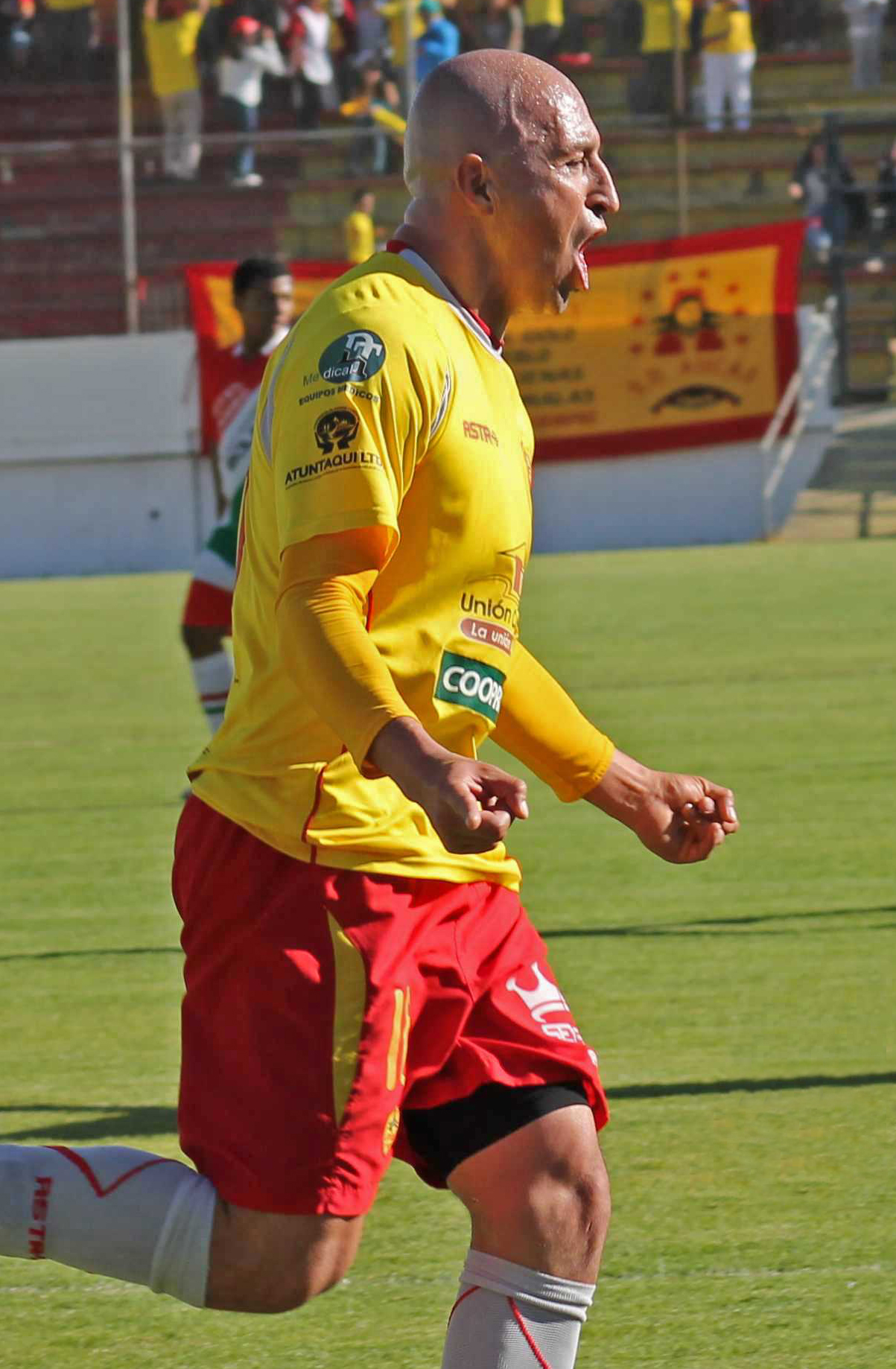 Wellington Sánchez jugando para Aucas en el 2012